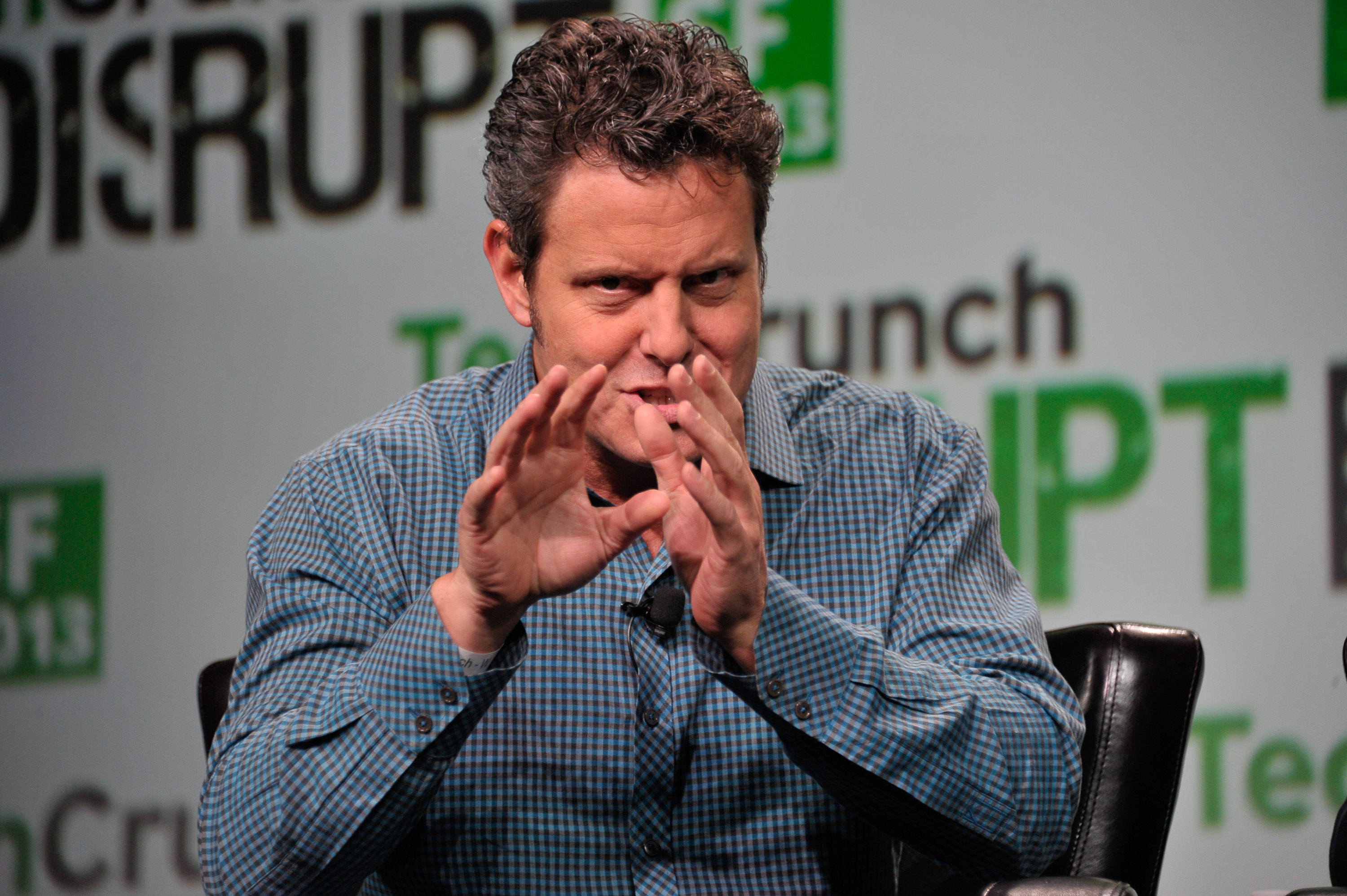 _SJP2559